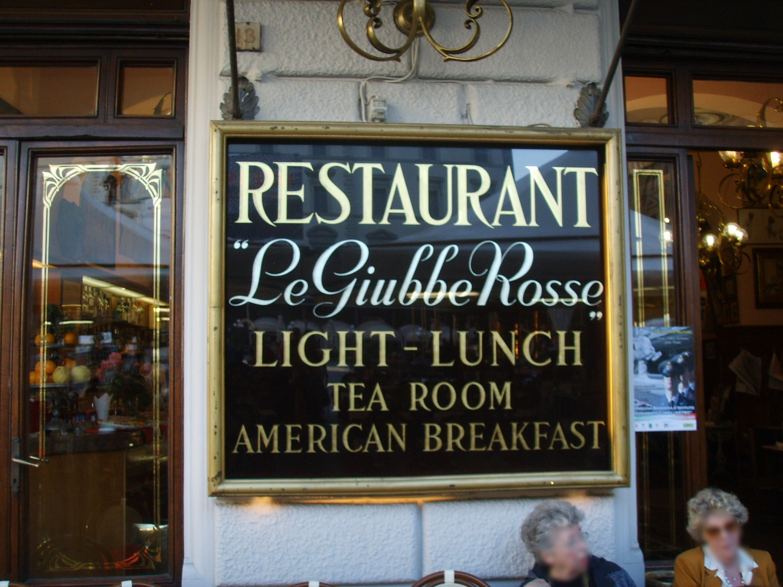 Caffé giubbe rosse insegna